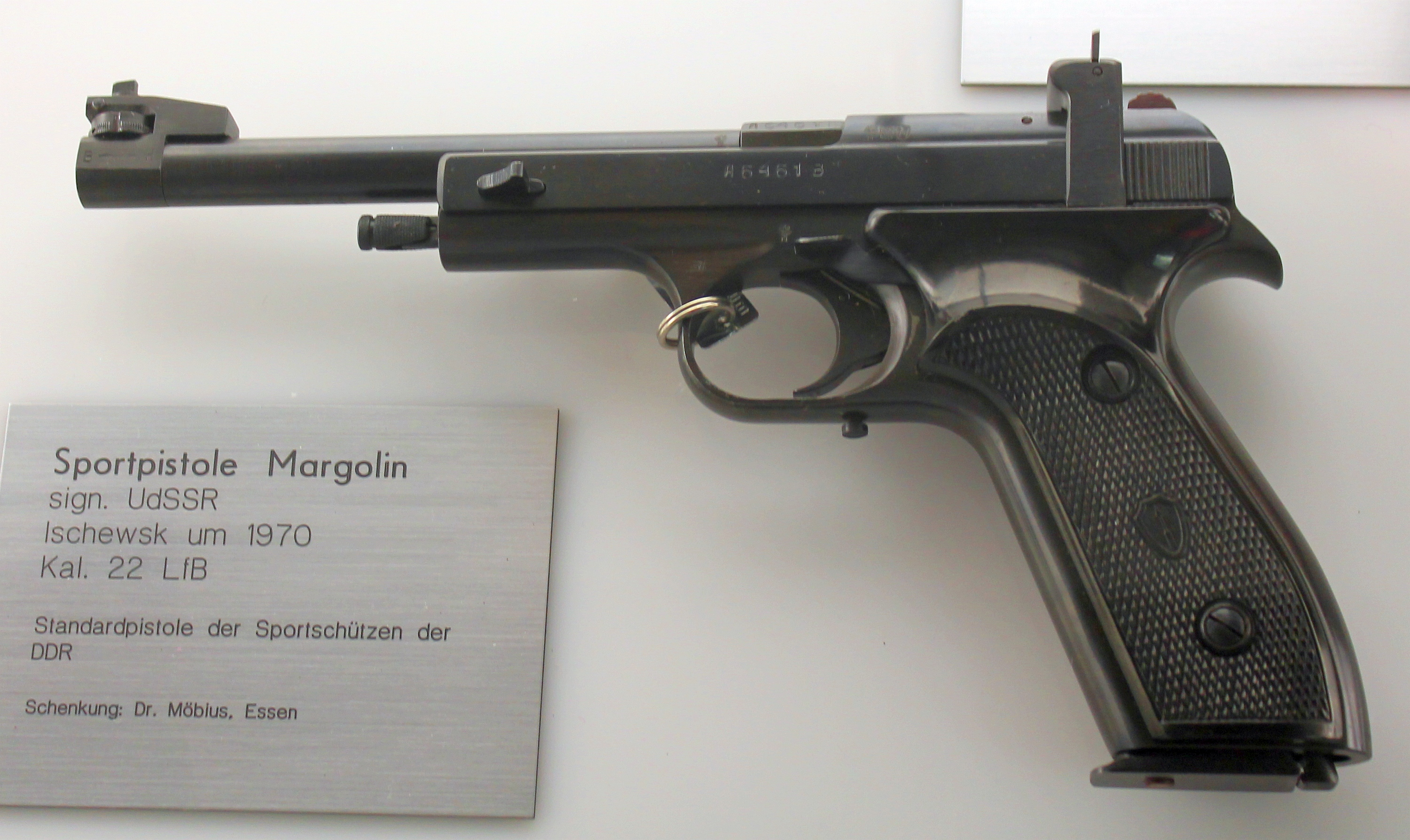 Margolin MZM Sportpistole im Waffenmuseum Suhl.